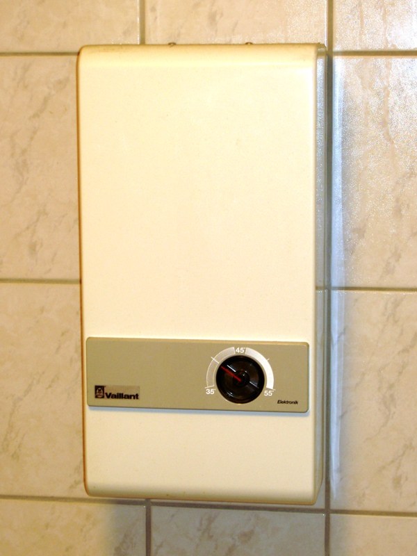 Durchlauferhitzer der Marke Vaillant.